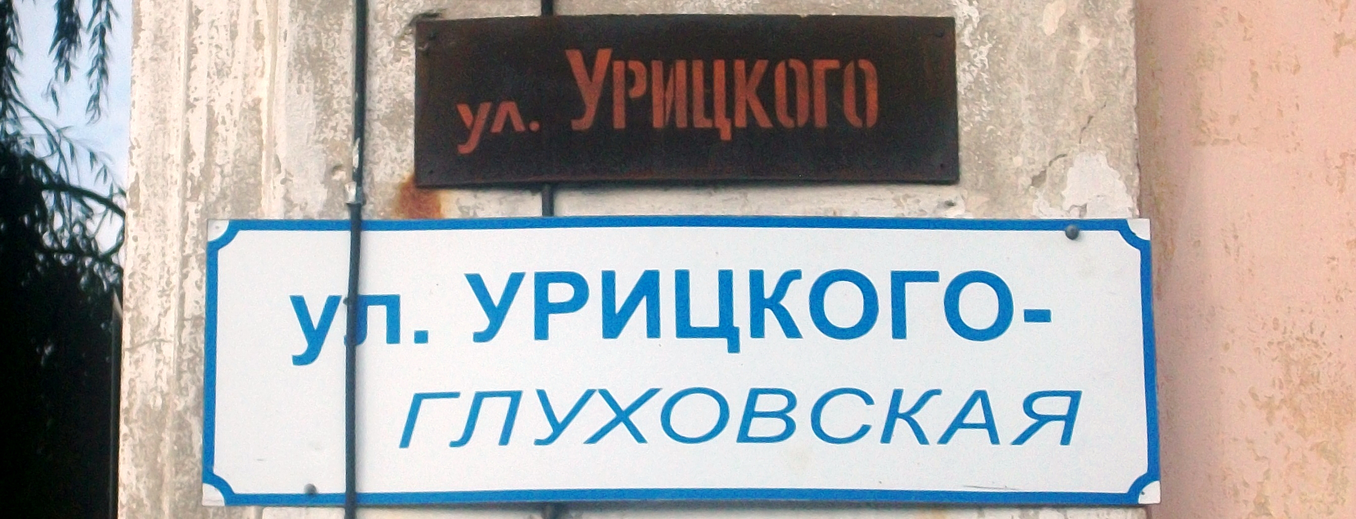 Вулиця Глухівська (Рильськ)